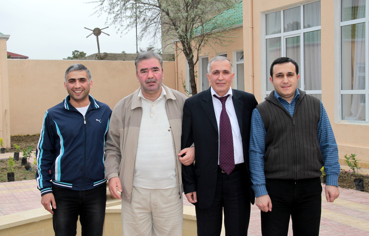 Siyavuş Əmirli, Məhəbbət Kazımov, Arif Məmmədli və Rəşad Abasov (Xırdalan şəhəri)